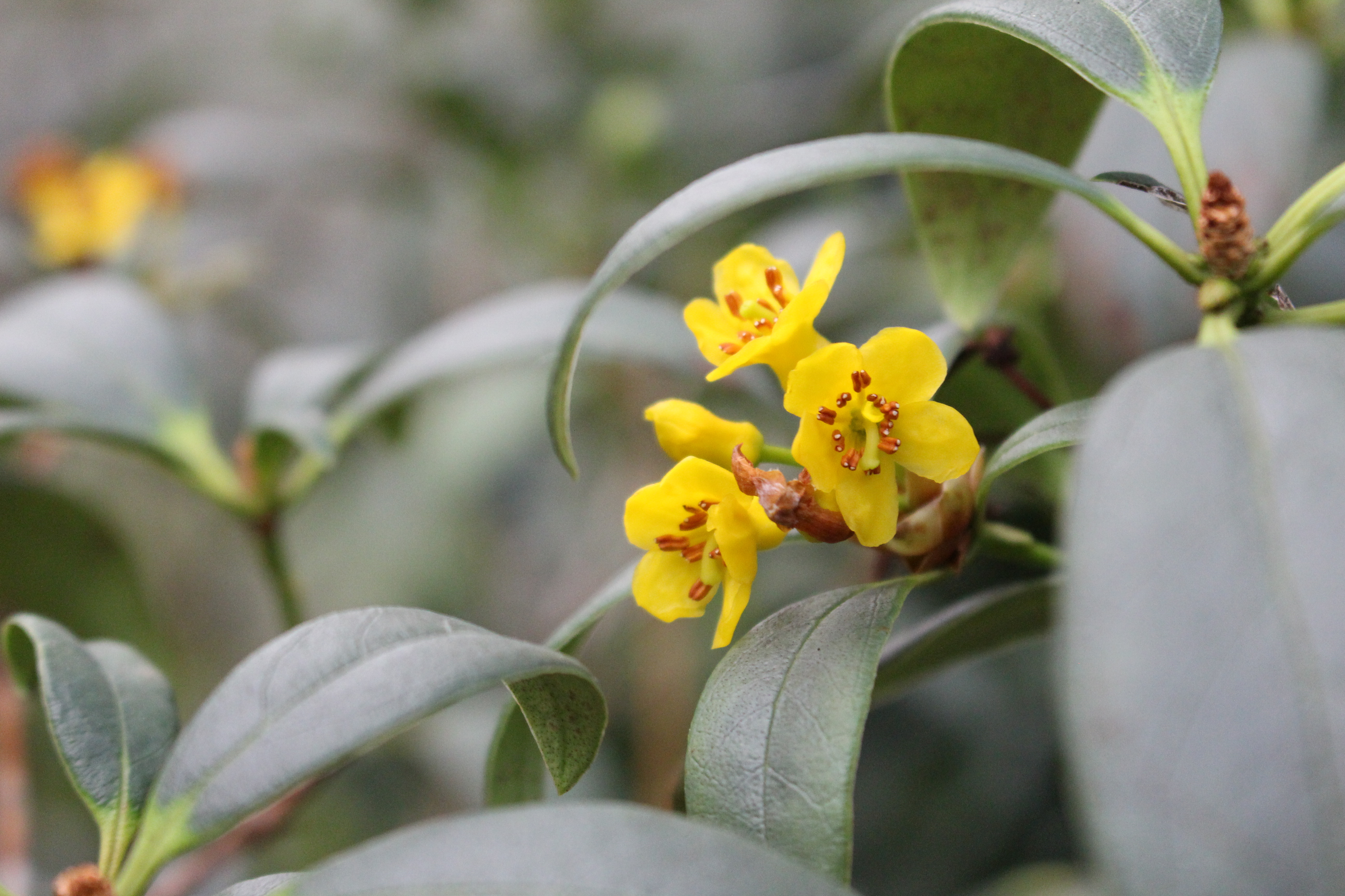 blom (Rhododendron rushforthii)